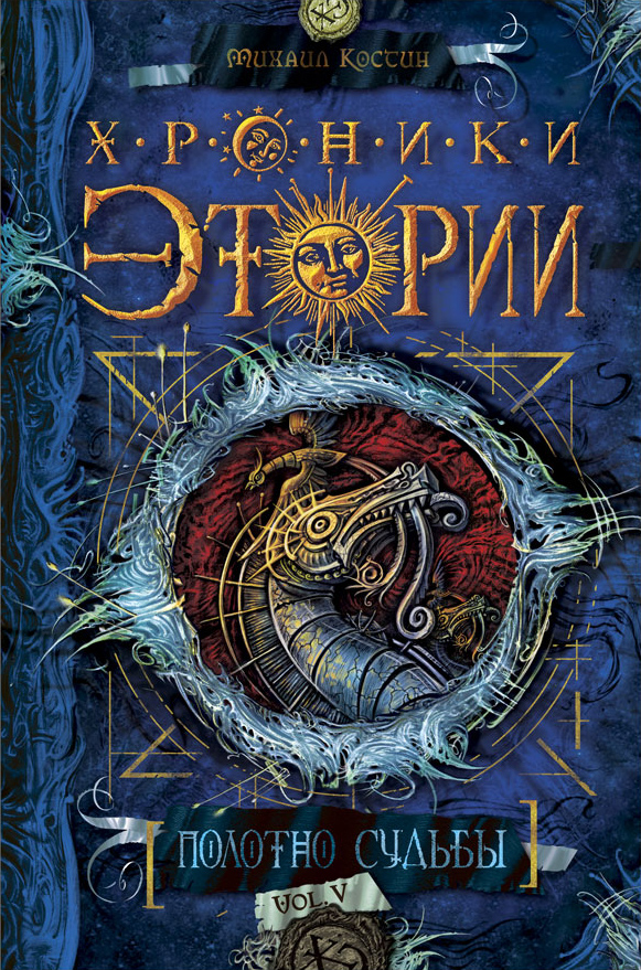 Обложка книги М. Костина «Хроники Этории. Полотно судьбы».